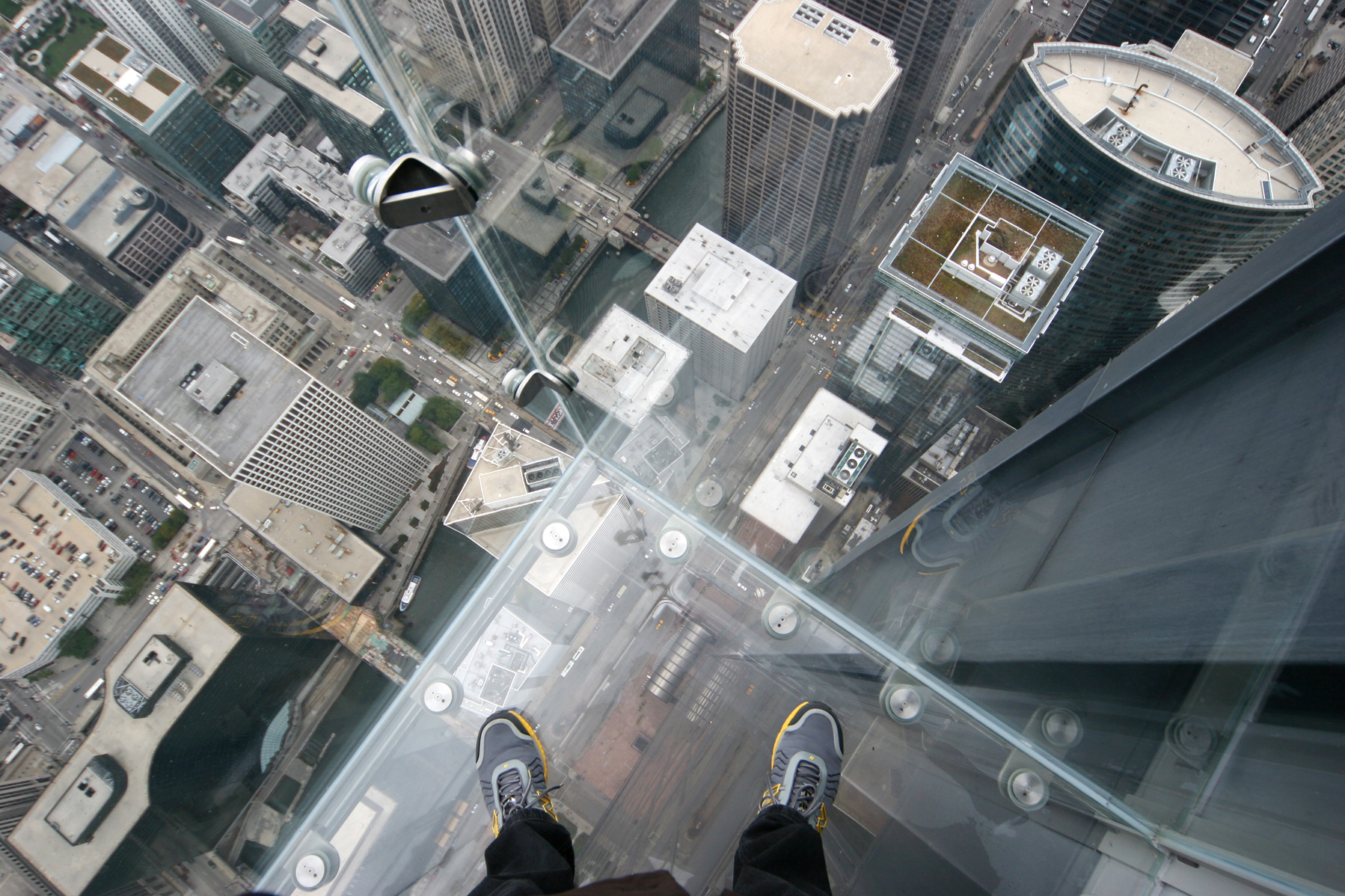 Glasbalkon Skydeck Sears-Tower, Chicago